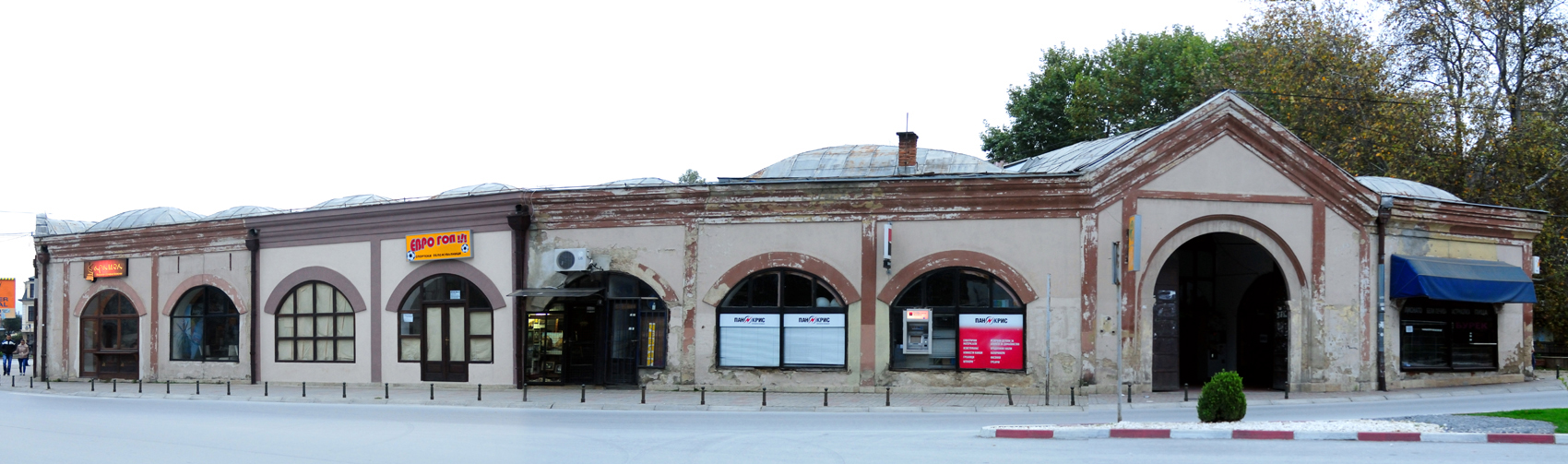 Bezisten Bitola